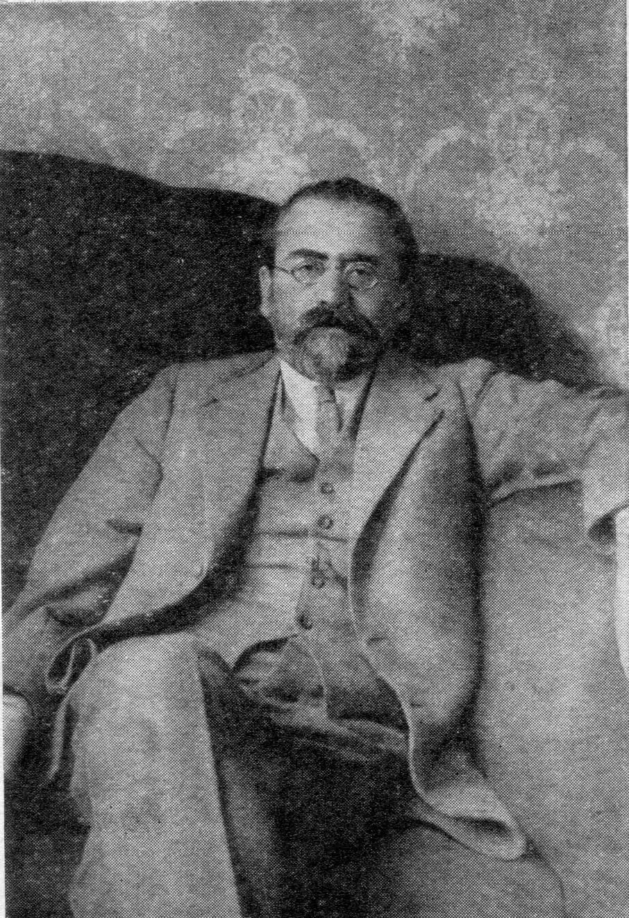 Ф. А. Ротштейн в годы эмиграции.